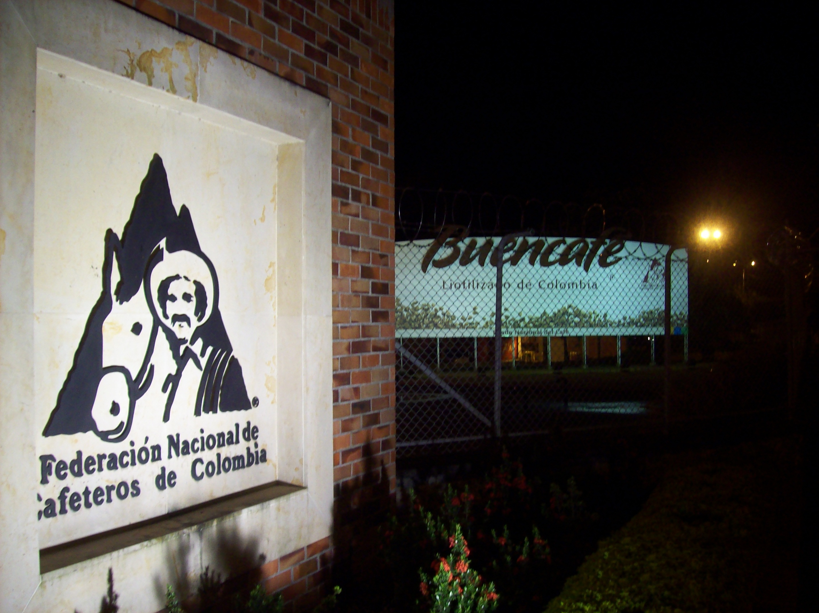 Vista frontal de la Fábrica de Café Liofilizado Buencafé, en Chinchiná, Caldas, Colombia.